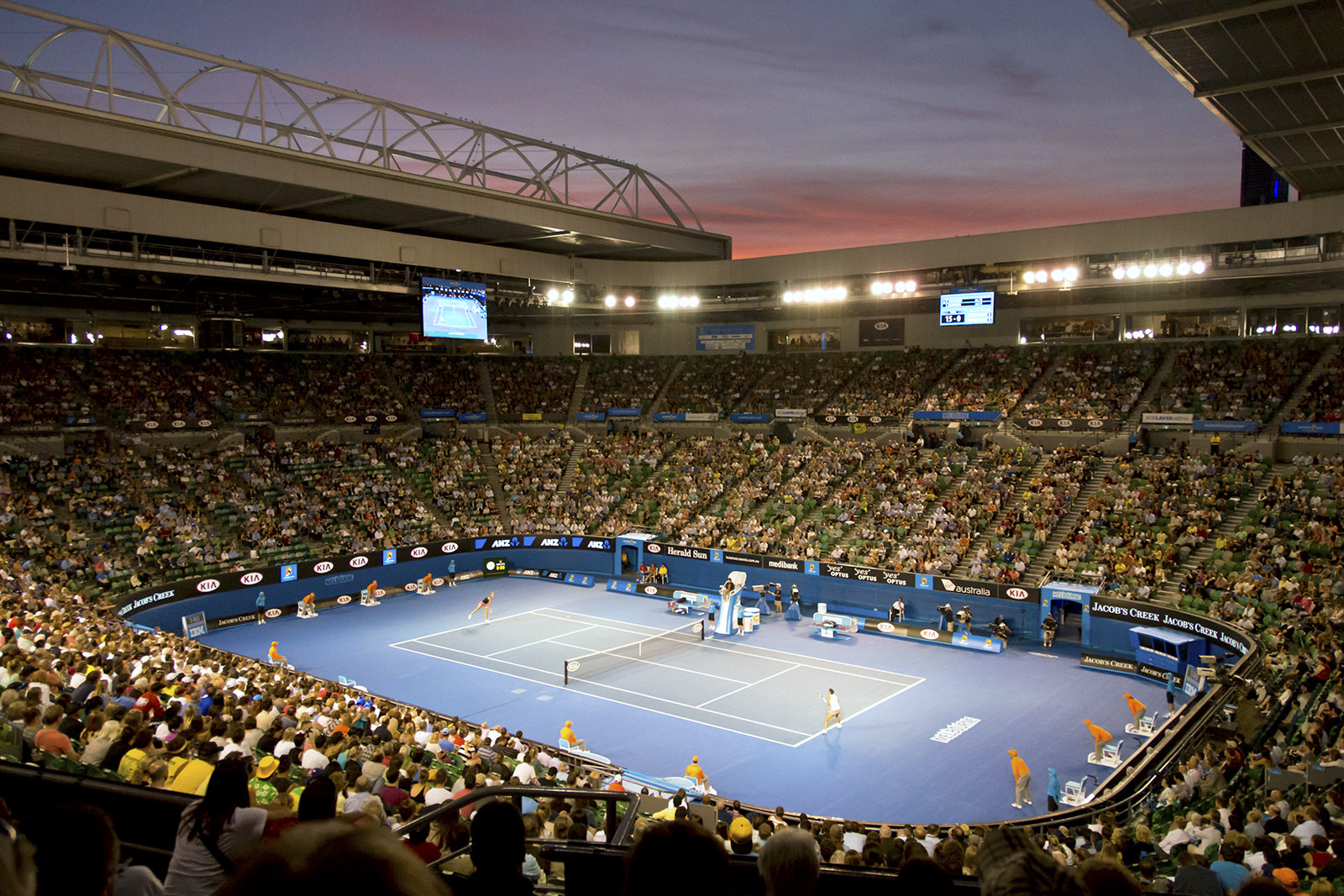 Centre Court at dusk